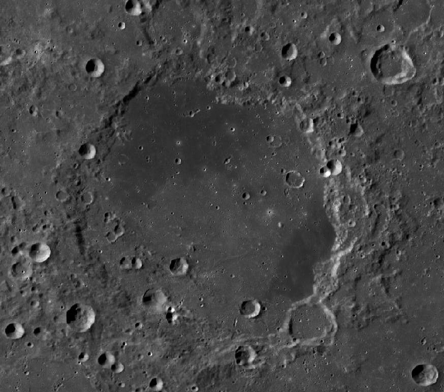 Cráter lunar Schickard. (Imagen LRO)